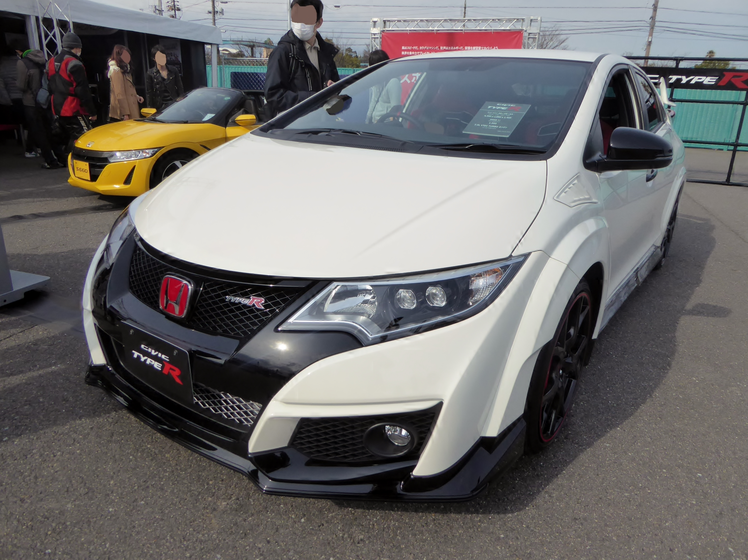 DBA-FK2型ホンダ・シビックタイプRをフロントから撮影。